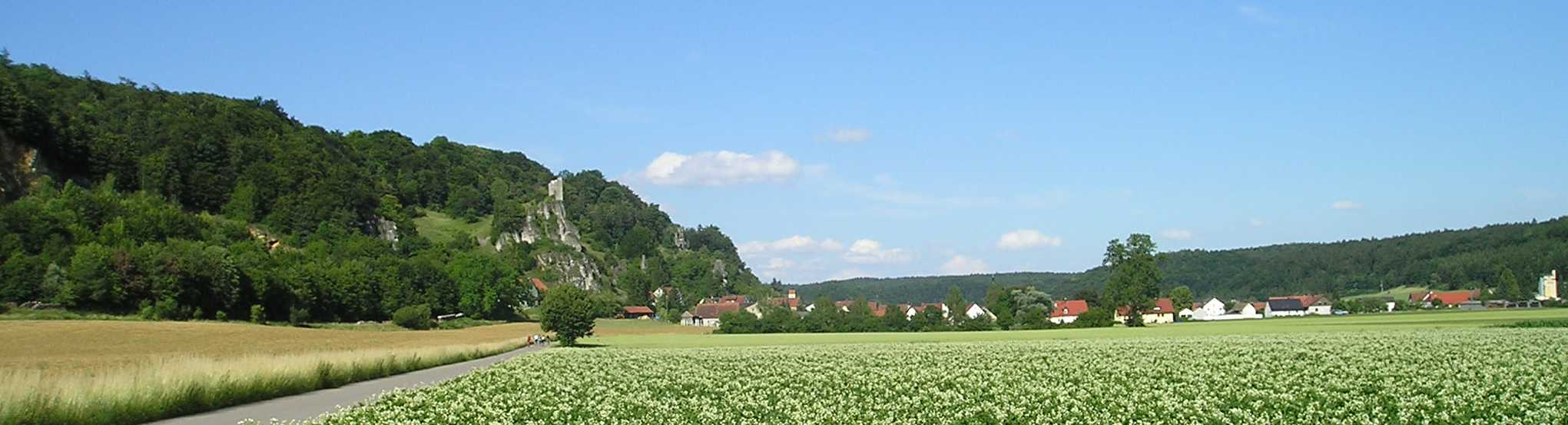 Hütting im Wellheimer Trockental, großes Flusstal einer pliozänen Urdonau ("Altmühdonau").